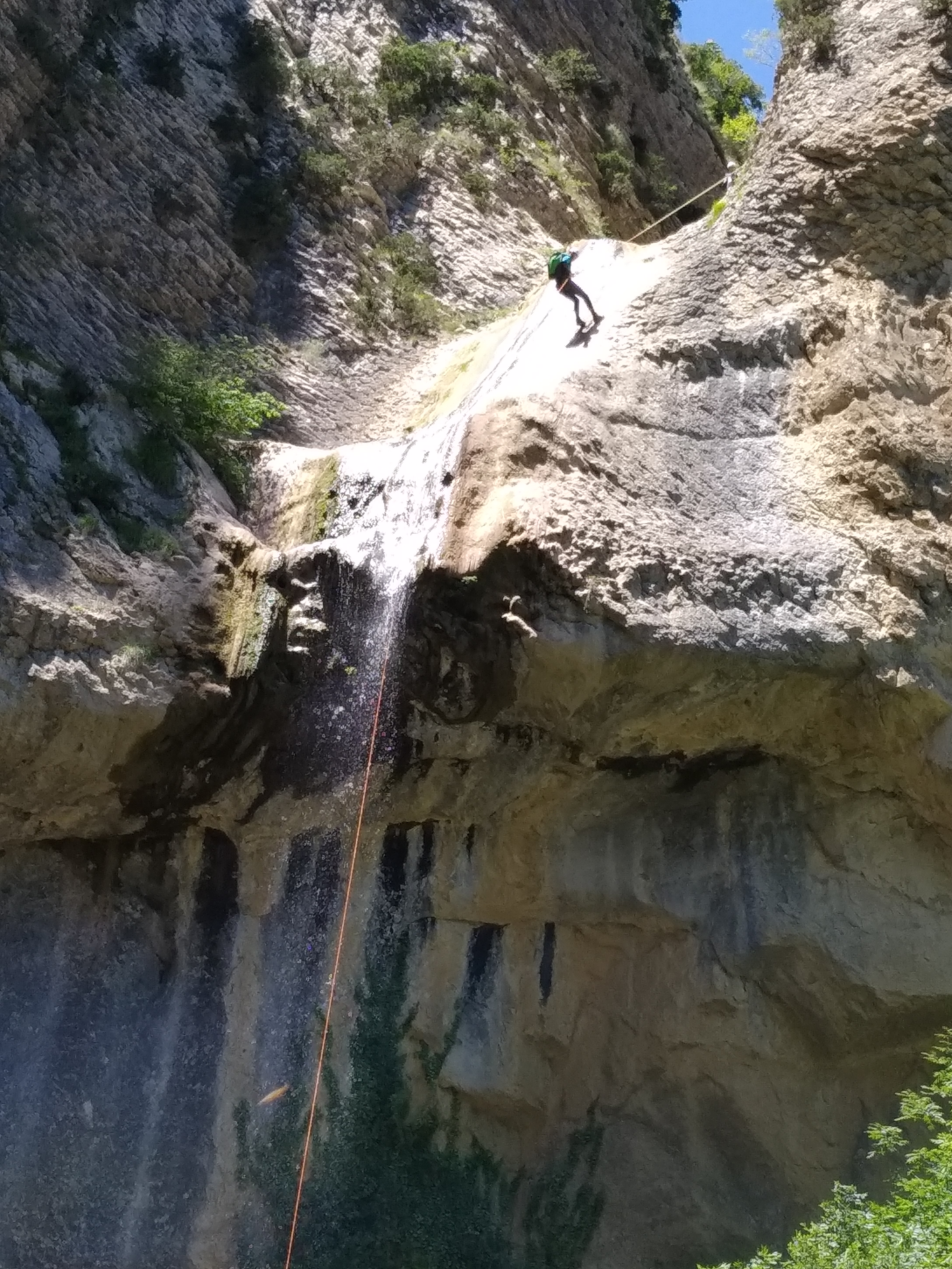 Ollaran